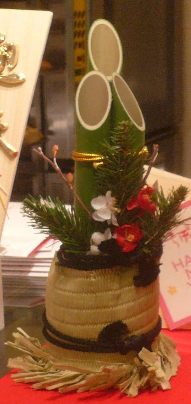 門松 kadomatsu